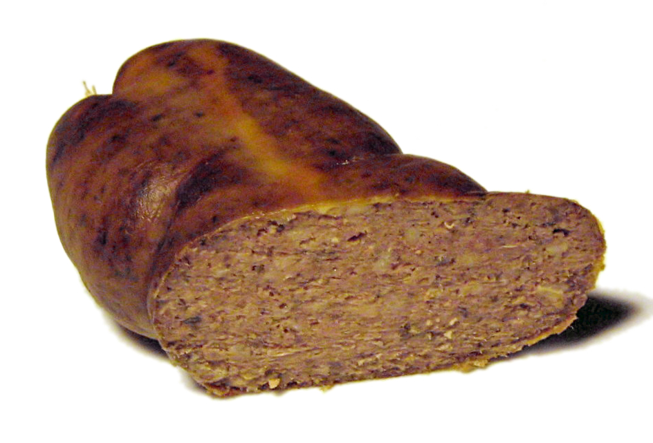 Leberwurst, gekocht und geräuchert